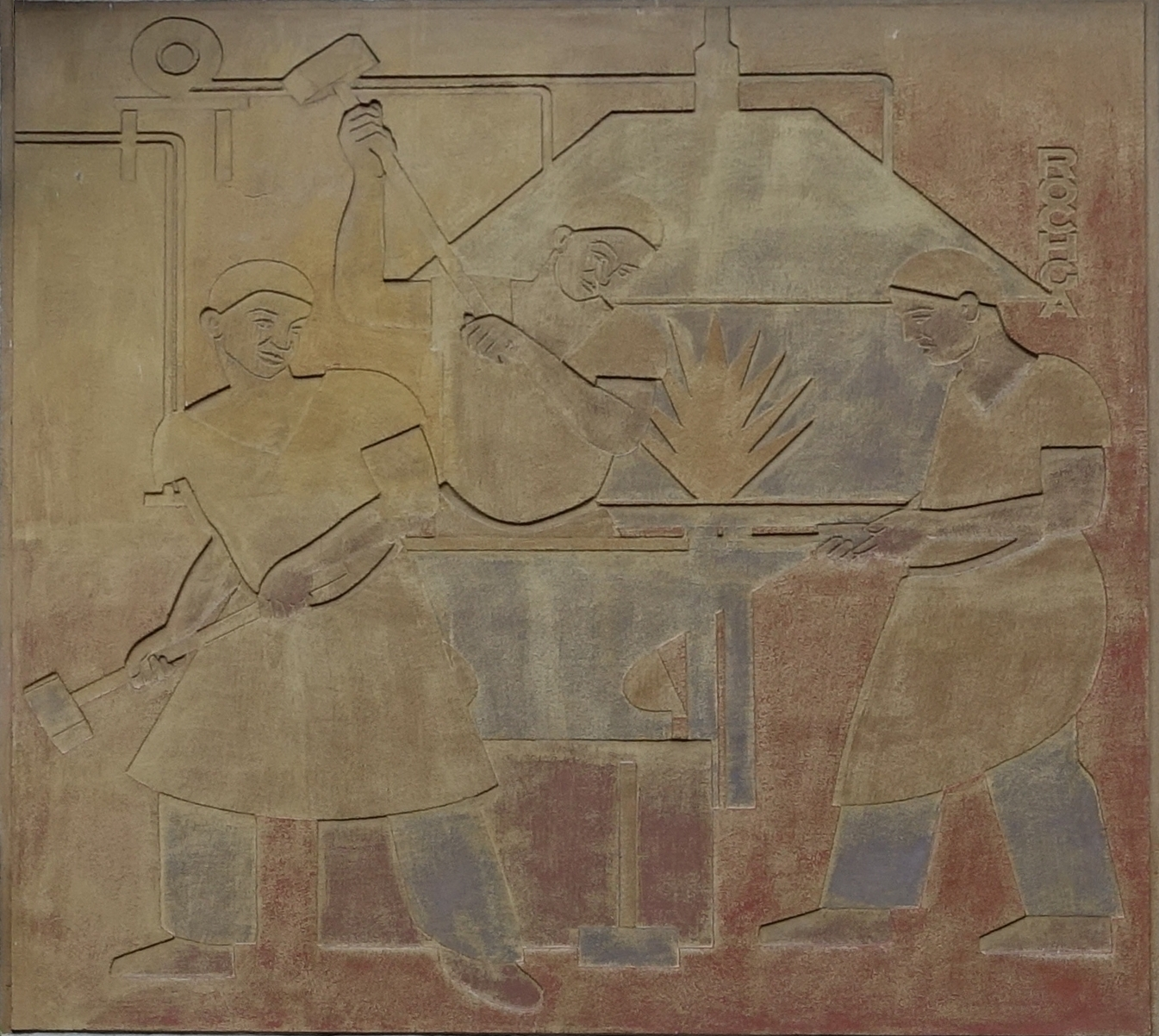 Relief von Rudolf Rochga an der Südflügelfassade der Kunstakademie Stuttgart, Relief 1 (von links): In der Schmiede. Rechts oben: Signatur „ROCHGA“.